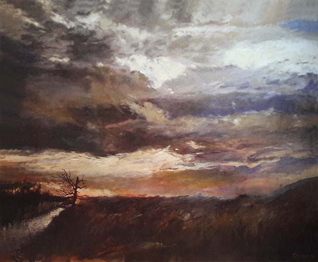 Himmel über der „Valle Umbra“, 2006, cm 100 x 120, Öl auf Leinwand, Bez. u.r. „Timner 2006“